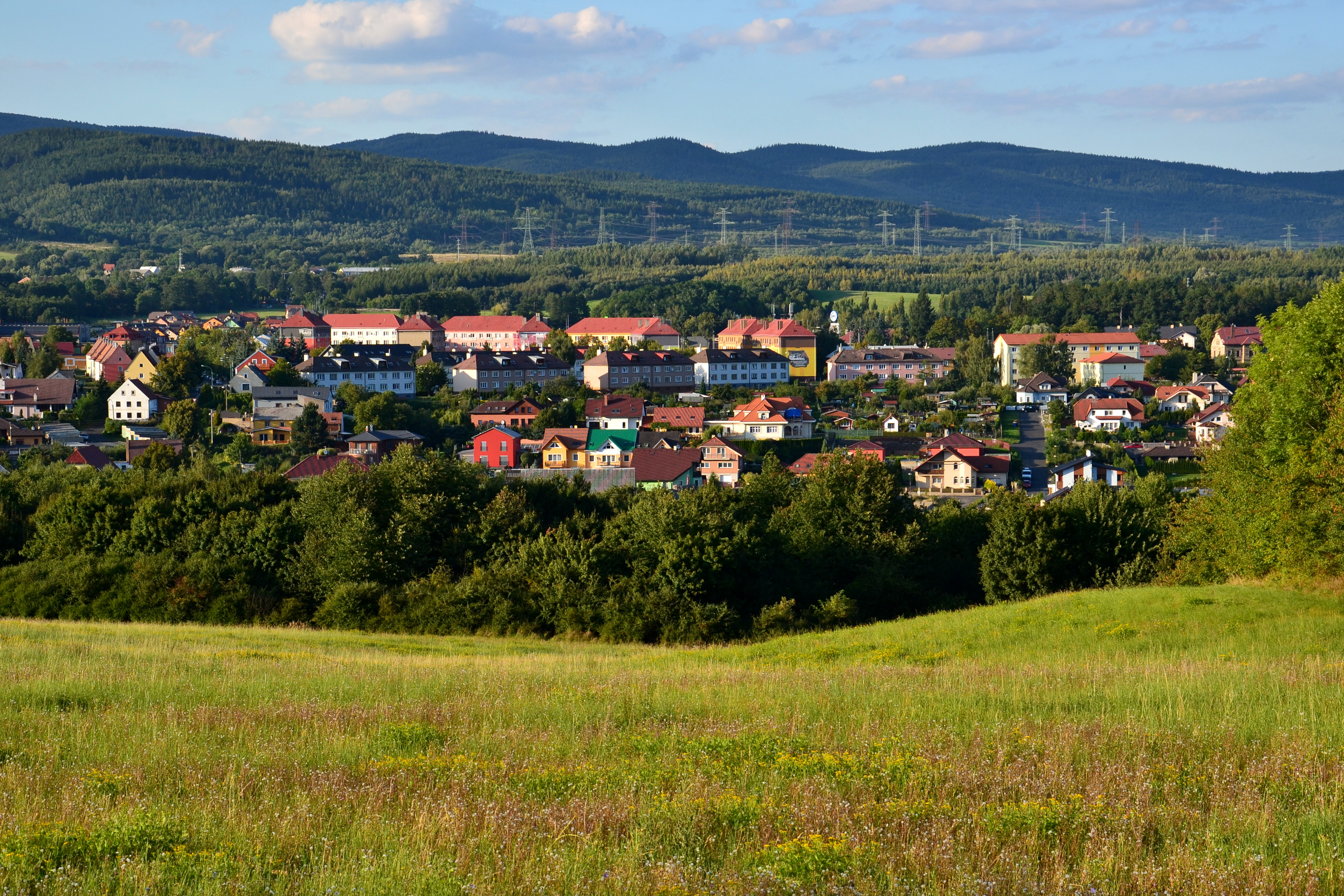 Pohled ze silnice do Rašovic